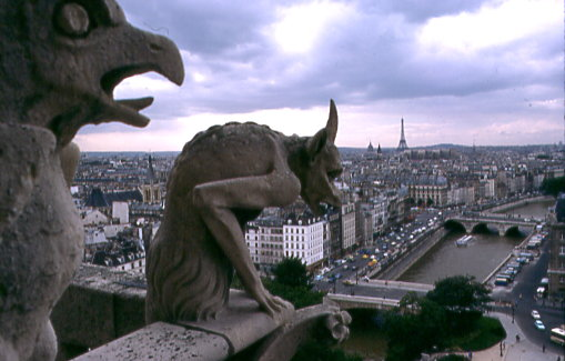 Gargoyles/Notre Dame